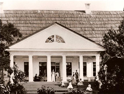 Поміщицький маєток (село Котовка, Магдалинівський район, Дніпропетровська область)